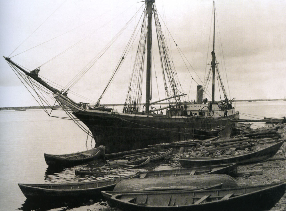 Подготовка к отплытию. «Святой мученик Фока» на окраине Архангельска, в Соломбале. 1912 год.